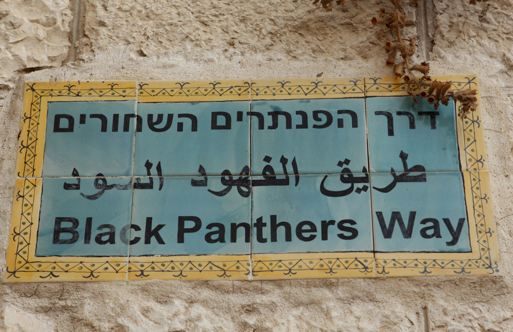 שכונת מורשה (מוסררה) ירושלים Jerusalem